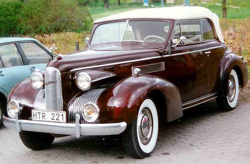 LaSalle Series 39-5067 Convertible Coupé 1939